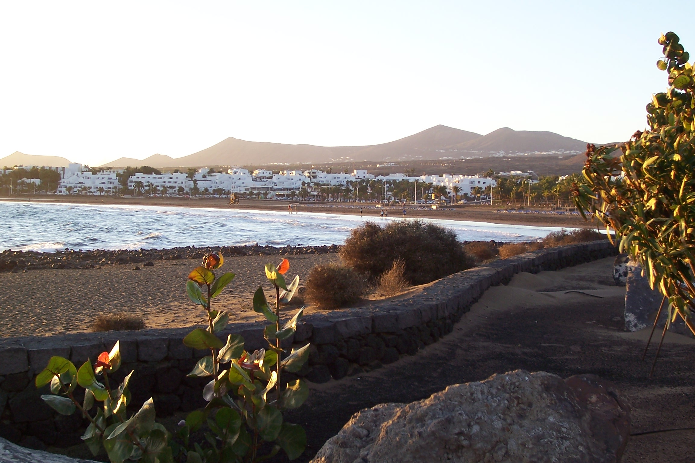 Strand bei Los Pocillos in Puerto del Carmen, Lanzarote